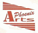 Jedna z podob loga pražské společnosti Phoenix Arts